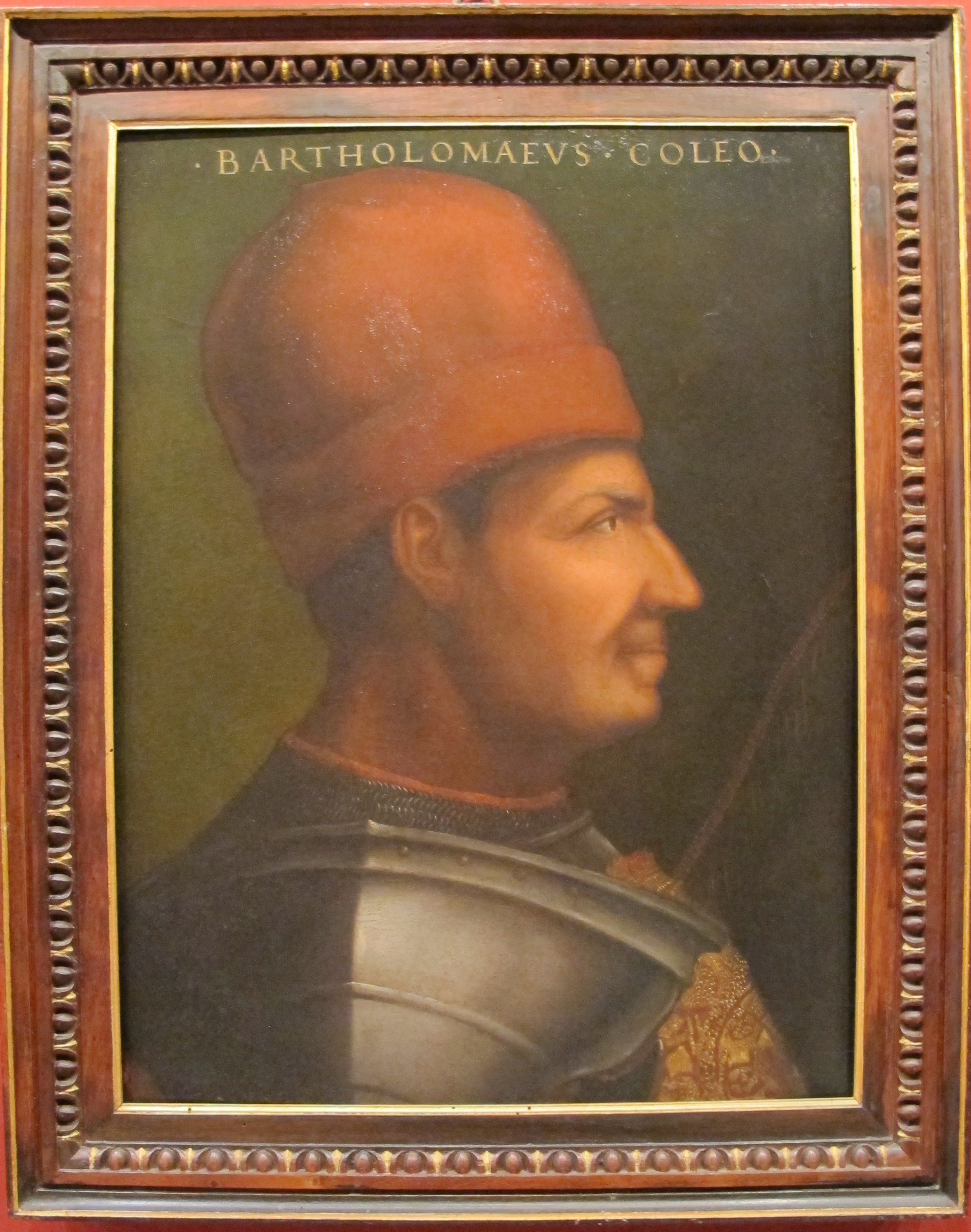 Cristofano dell'altissimo, bartolomeo colleoni, ante 1568